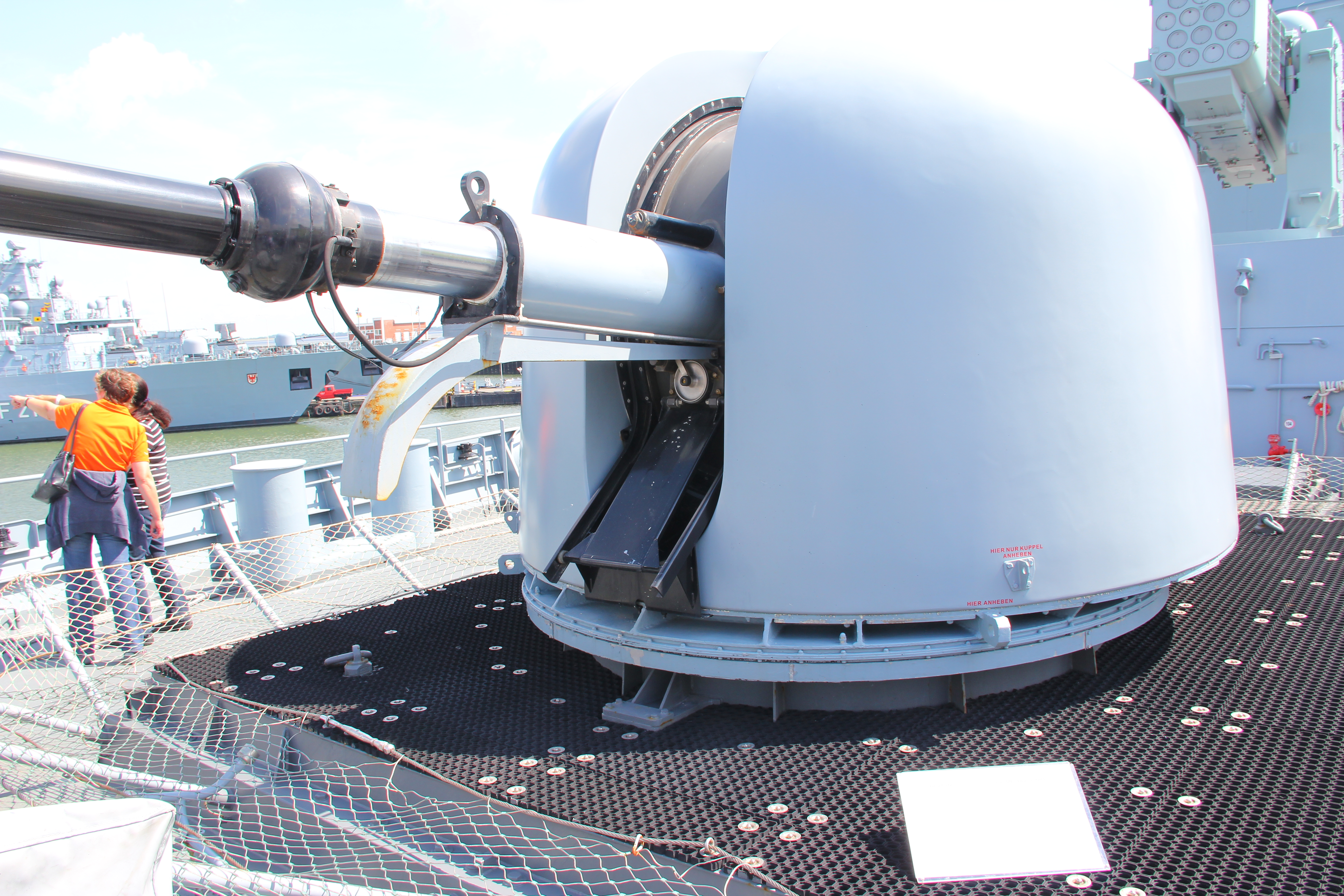 Fregatte Hamburg, F220